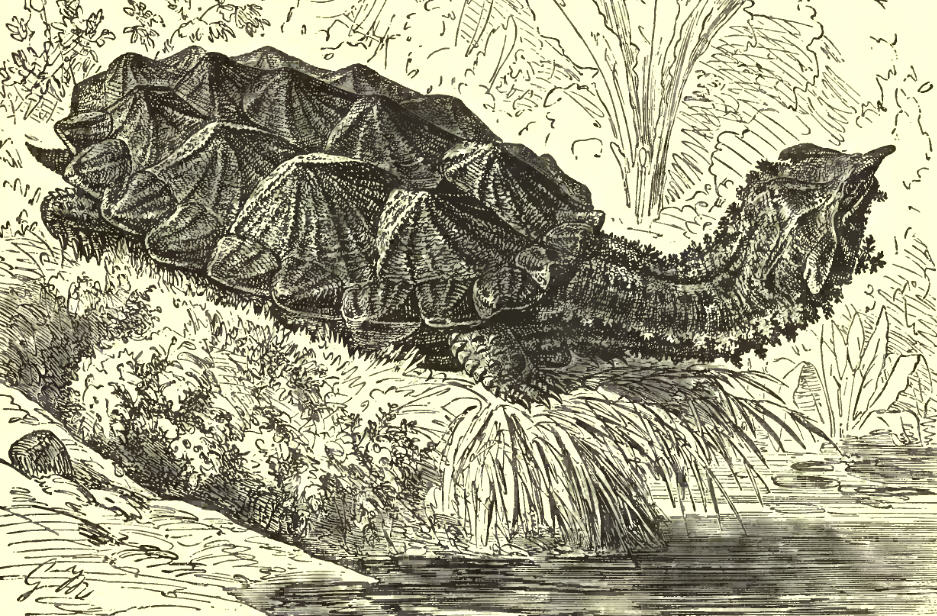 Matamata turtule